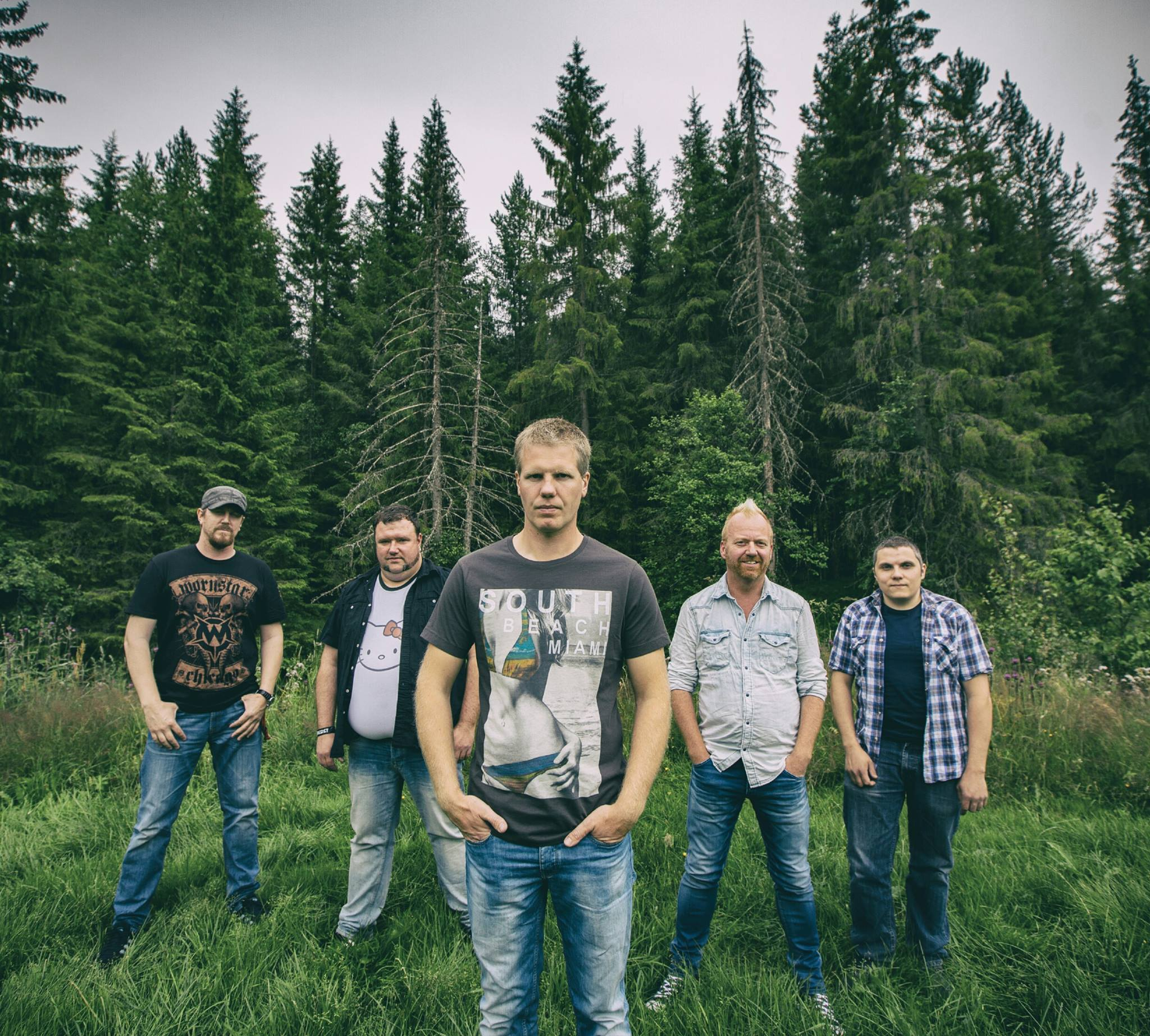 Offisielt bilde av Gunslingers. Hentet fra